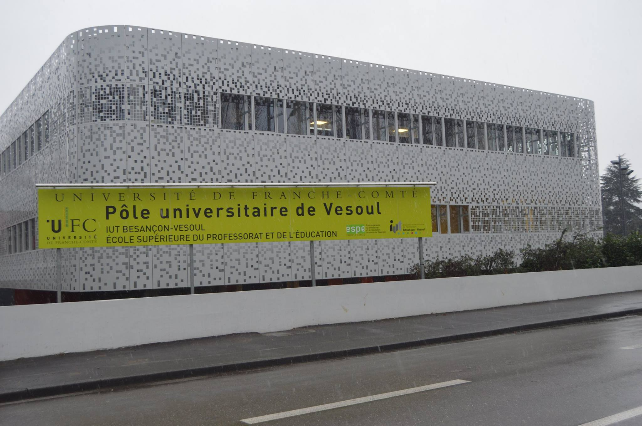 Le pole universitaire de Vesoul (Haute-Saône)